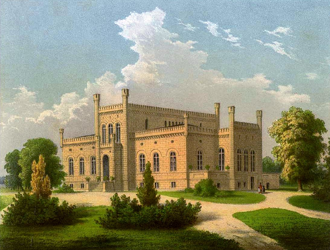 Rittergut Libnow (Libbnow), Kreis Greifswald, Provinz Pommern